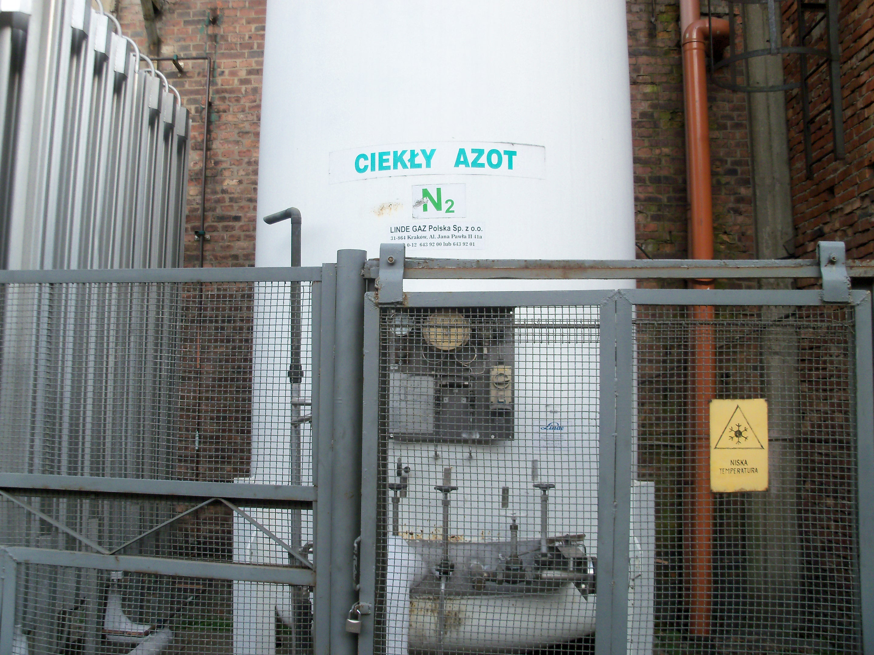 Huta Baildon w Katowicach - zbiornik z ciekłym zotem